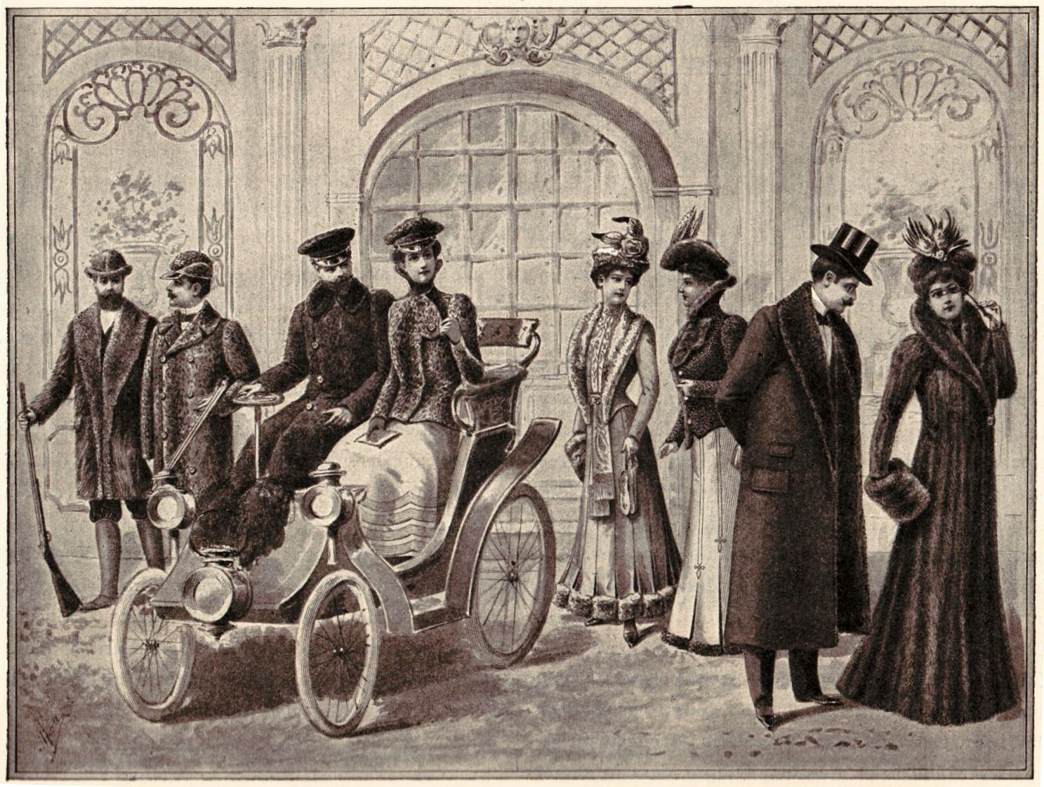 Furrier`s work for the Exposition Universal Paris 1900 Ausstellungsgruppe des Hauses Revillon Frères, Paris. Fig. 1 - Jagdpaletot aus Schweizer Ziegen mit Griesfuchsbesatz. Verbrauch: 5 Ziegen Futter: Carrierter Wollstoff Fig. 2 - Jagdpaletot aus naturellem Seehund, Mütze ebenfalls. Verbrauch: 8 Seehunde Futter: Carrierter Wollstoff. Fig. 3 - Automobilpaletot aus naturellem Schuppen mit halbgeschorenem Bieberkragen. Verbrauch: 48 Schuppen, 1 Bieber. Fig. 4 - Halbanliegendes Damenjakett aus naturellem Seehunf. Mütze ebenfalls. Verbrauch: 6 Seehunde. Fig. 5 - Eiscostüm, Kleid und Jakett mit Chinchilla besetzt. Verbrauch: 26 Perufelle. Fig. 6 - Persianerjakett mit Nerzbesatz. Nerzhut. Verbrauch: 14 Persianer; 10 Nerze. Fig. 7 - Herrenpelz mit Zobelklauenfutter und Seeotterbesatz. Verbrauch: 500 Zobelklauen; 1 Seeotterfell Fig. 8 - Langer Mantel aus Canada Nerz mit Shalkragen aus virginischem Otter. Verbrauch: 164 Nerze; 1 Otter. Arbeitszeit für den Gesellen: 240 Stunden - für die Näherin: 1400 Stunden. Der Körper besteht aus 27 Fellbreiten, die von unten bis oben gehen ohne sichtbare Quernähte, und 5 Fellhöhen. Die Ärmel aus 9 Breiten und 2 Fellhöhen. Alle Felle sind stark ausgelassen und in wirklich tadelloser Weise zusammengesetzt. Vom reintechnischen Standpunkte aus, war dieser Mantel wohl das schönste Stück moderner Kürschnerarbeit der ganzen Ausstellung. Die photographische Reproduktion giebt leider nur ein unvollkommenes Bild dieses Meisterwerks der Kürschnerkunst.